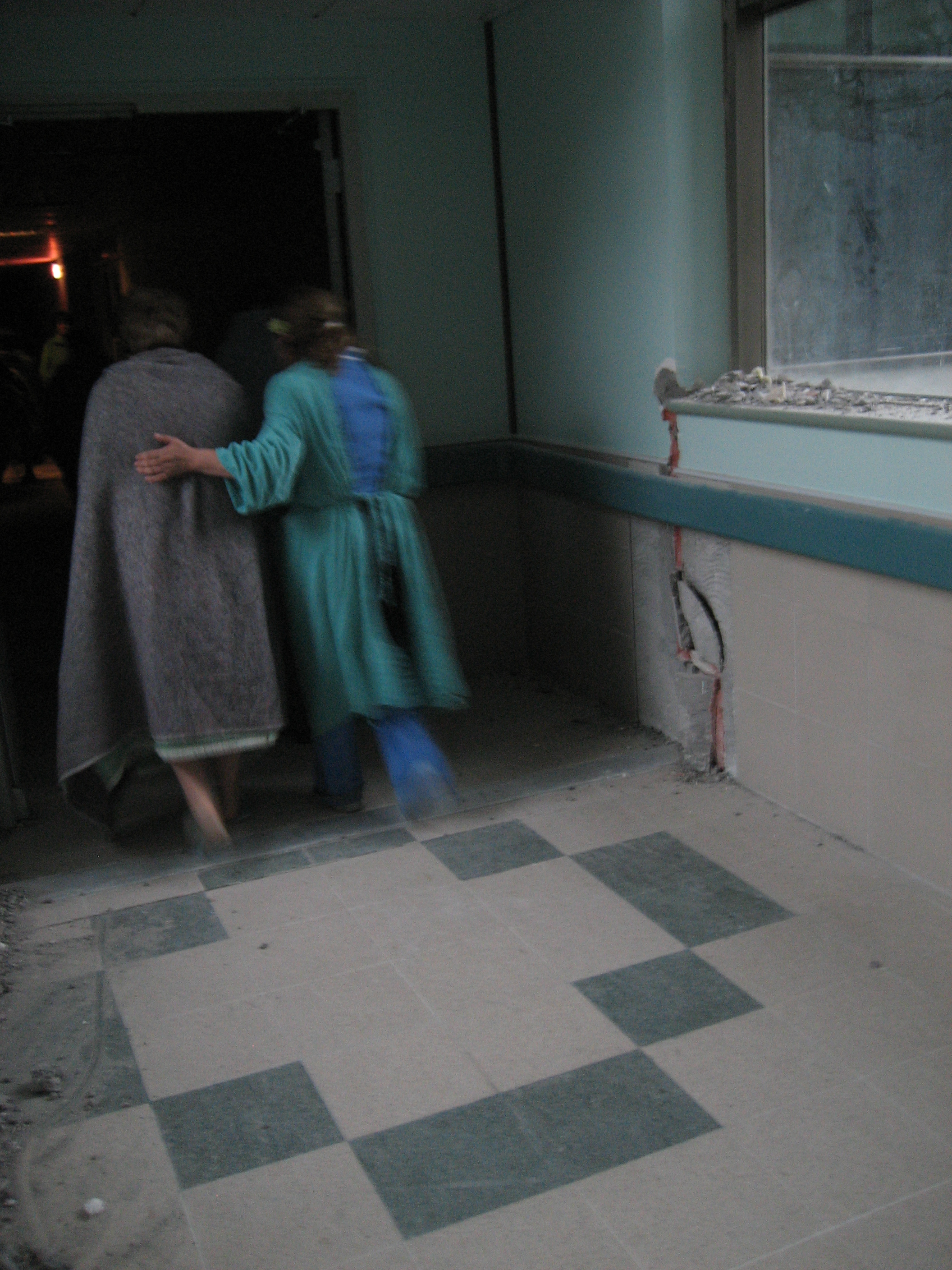 En Temuco, el nuevo hospital debió habilitarse de urgencia para recibir a los pacientes derivados del Hospital Hernán Henríquez, que debió ser evacuado tras el terremoto del 27 de febrero de 2010.